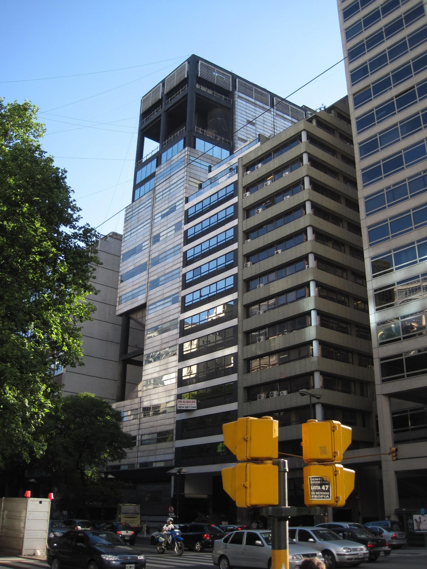 Edificio de la Caja de Ayuda y Subsidio para Familiares del personal de la Industria (CASFPI), actualmente sede del Ministerio de Trabajo de la Nación de la República Argentina. Avenida Leandro N. Alem 651, Buenos Aires.